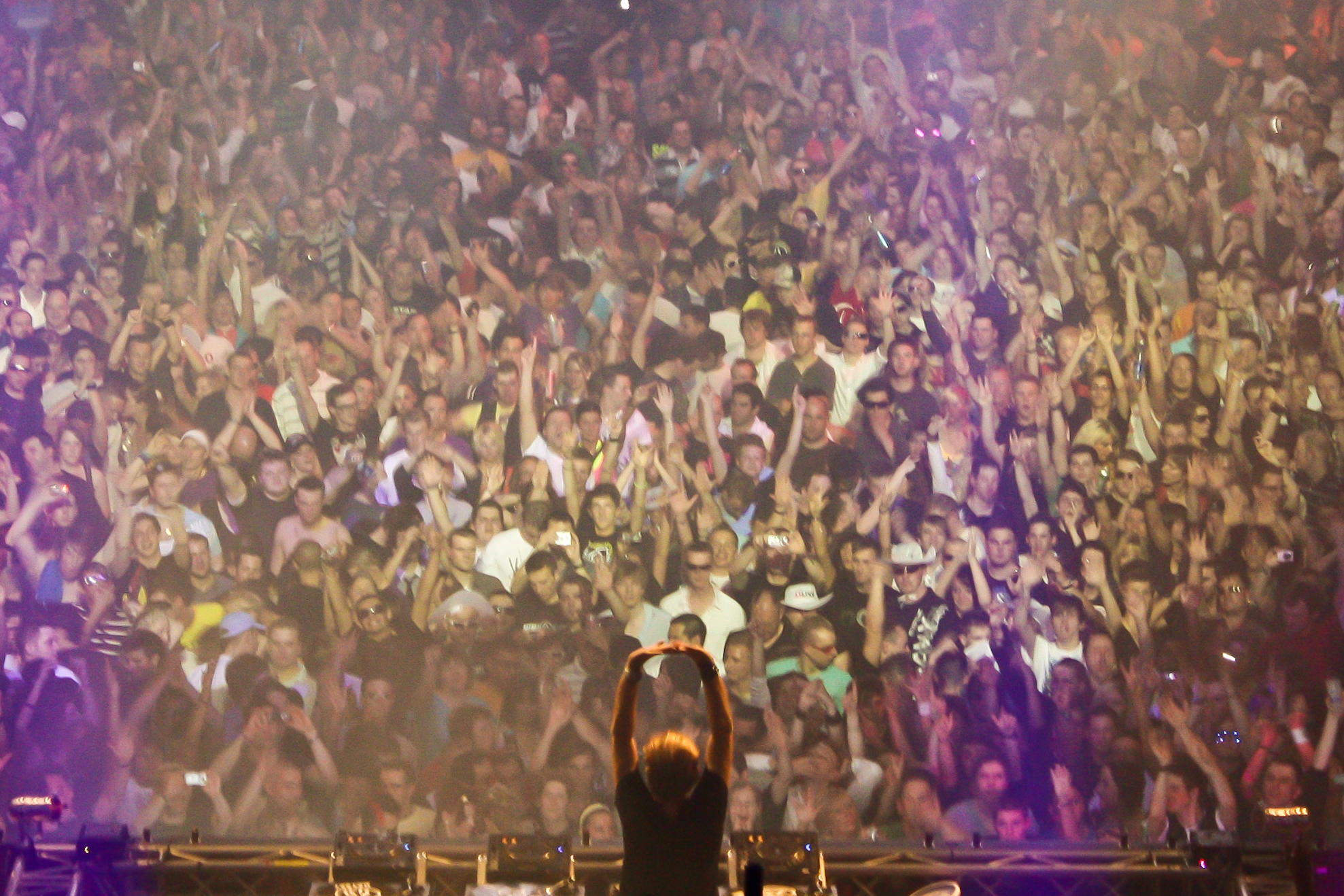 Sven Väth bei der Mayday 2009 in Dortmund, Blick von hinter der Hauptbühne Richtung Publikum